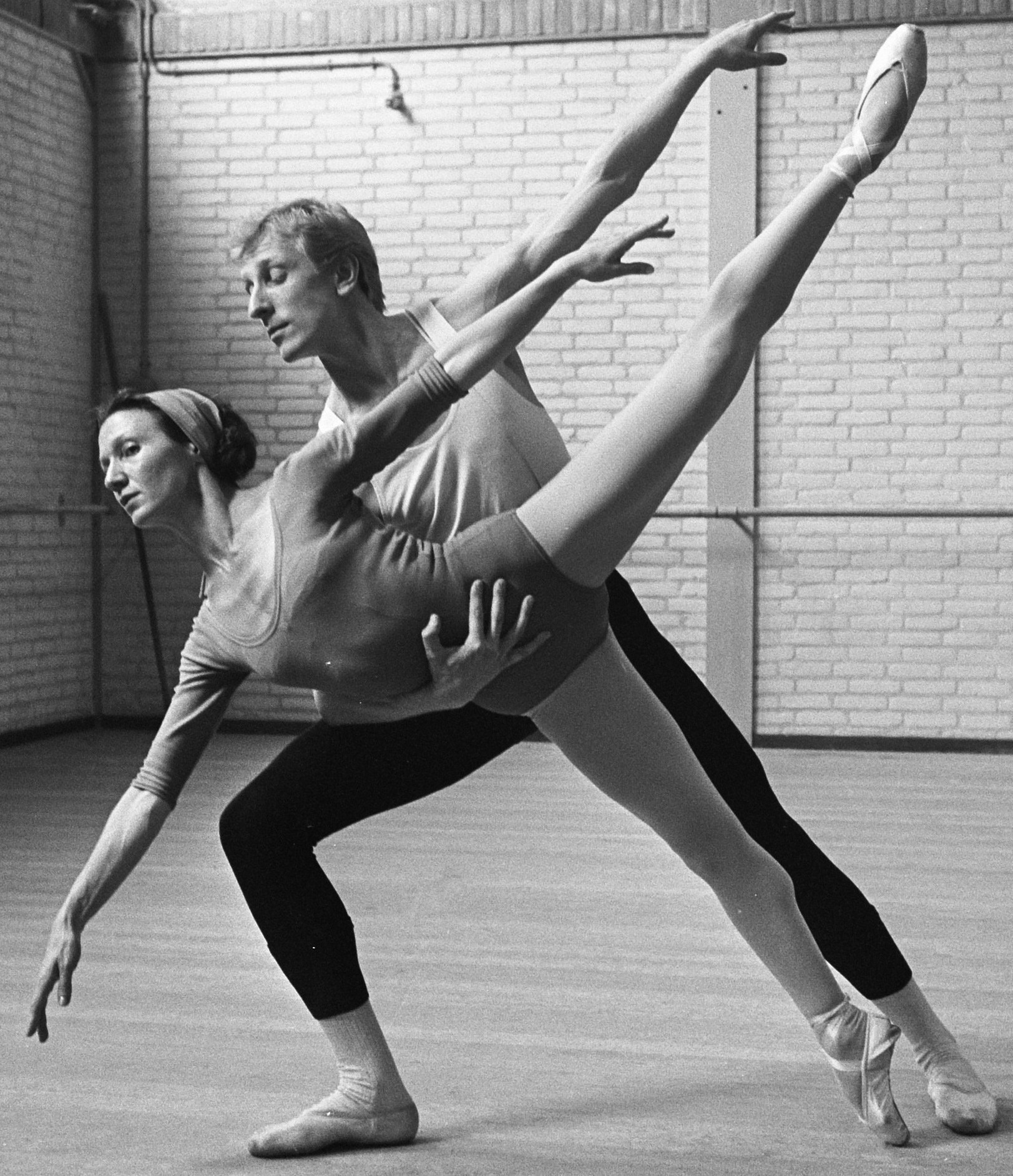 Holland Festival , de twee Russische gastsolisten Violetta Bovt en Arkadij Nikolaev tijdens repetitie